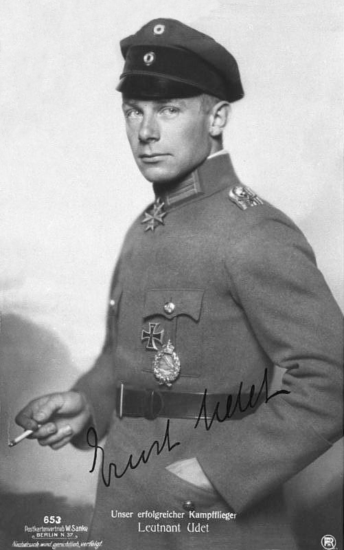 Unser erfolgreicher Kampfflieger Leutnant Udet 653 Postkartenvertrieb W. Sanke, Berlin N.37